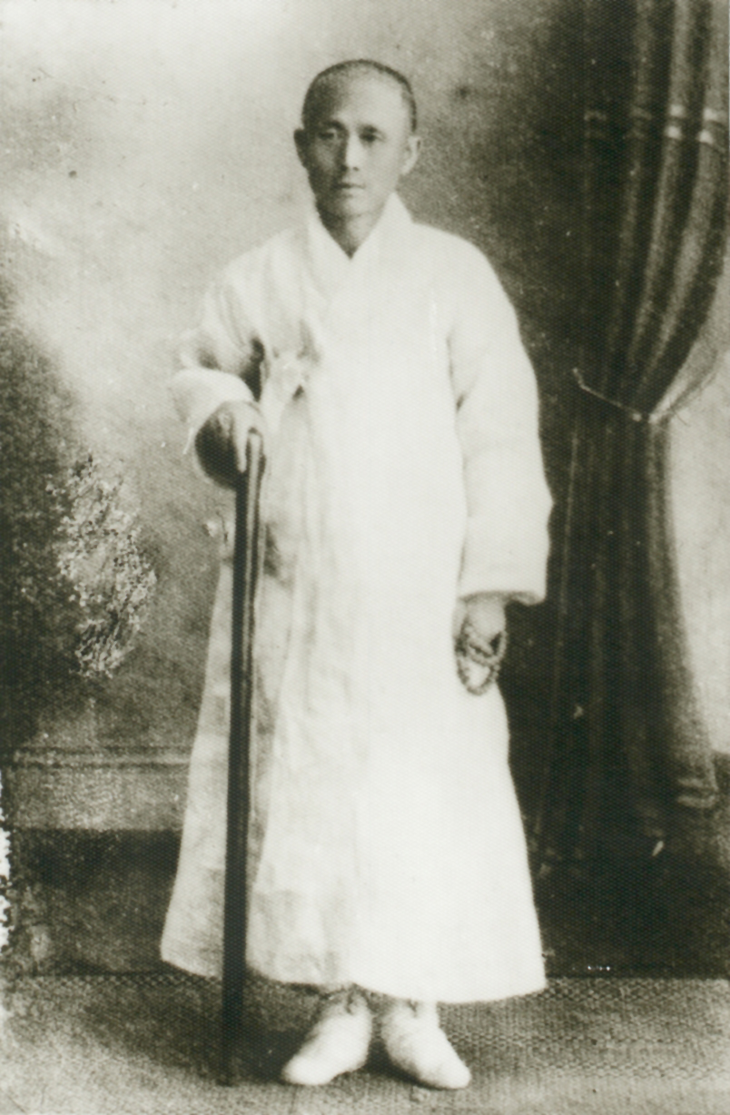 나철(羅喆)